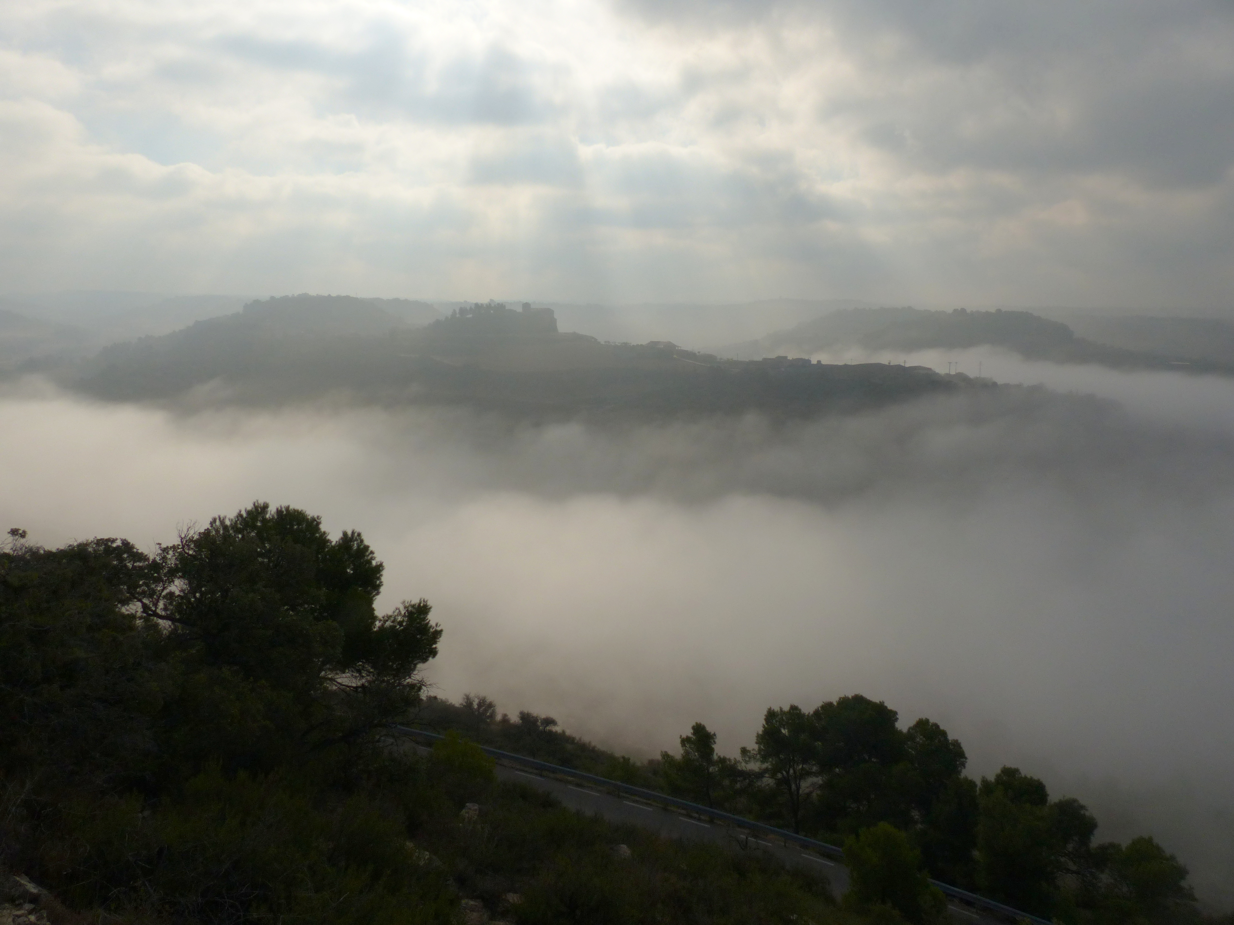 Paisatge del poble de Montornès de Segarra, vist des de la vessant nord, un matí de tardor amb boira baixa.